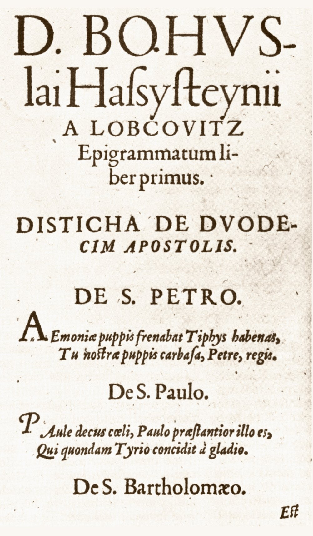 Titulní list básní Bohuslava Hasištejnského z Lobkovic z roku 1570